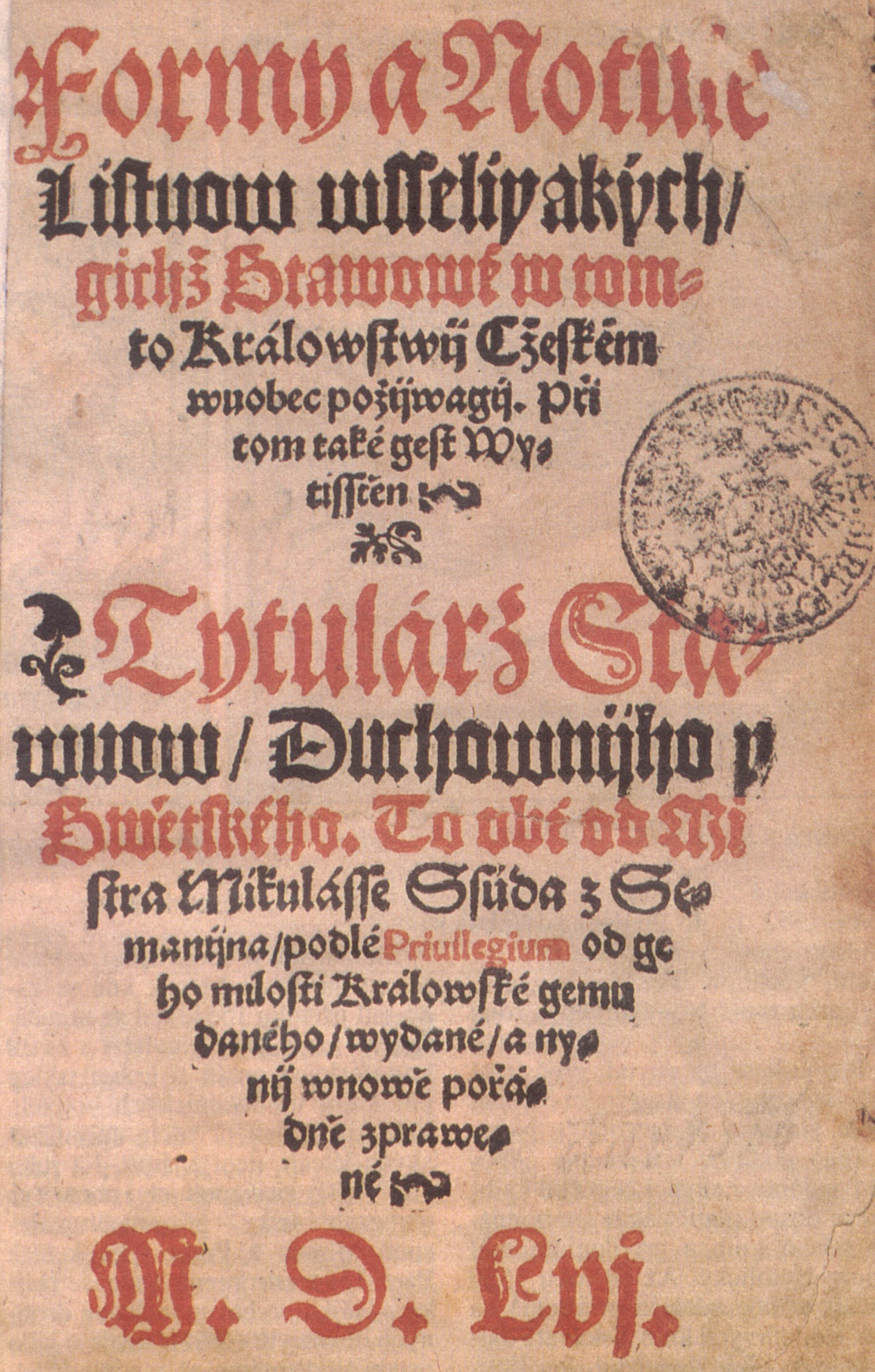 Titulní list Šúdových Forem a Notulí, čili Tytuláře z roku 1556